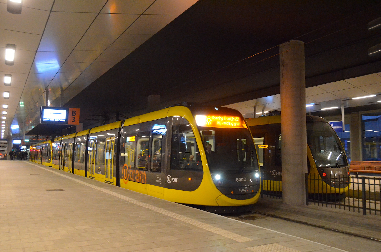 Tramstel 6002 van de Uithoflijn op de halte Utrecht CS Centrumzijde, op de openingsdag; 14 december 2019. Foto: Erik Swierstra.